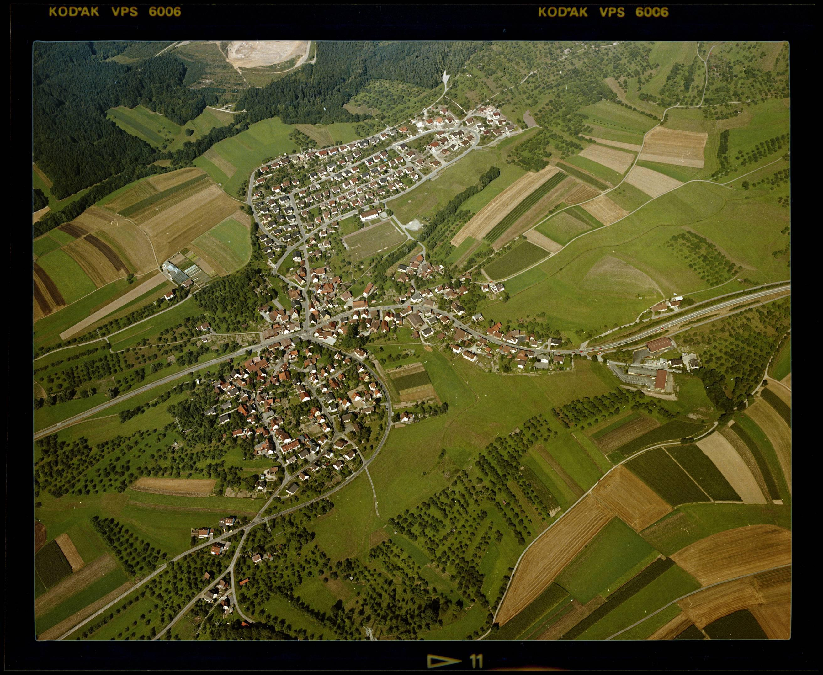 Luftbild von Steinbach - Staatsarchiv Sigmaringen - Archivalieneinheit N 1/96 T 1 Nr. 312